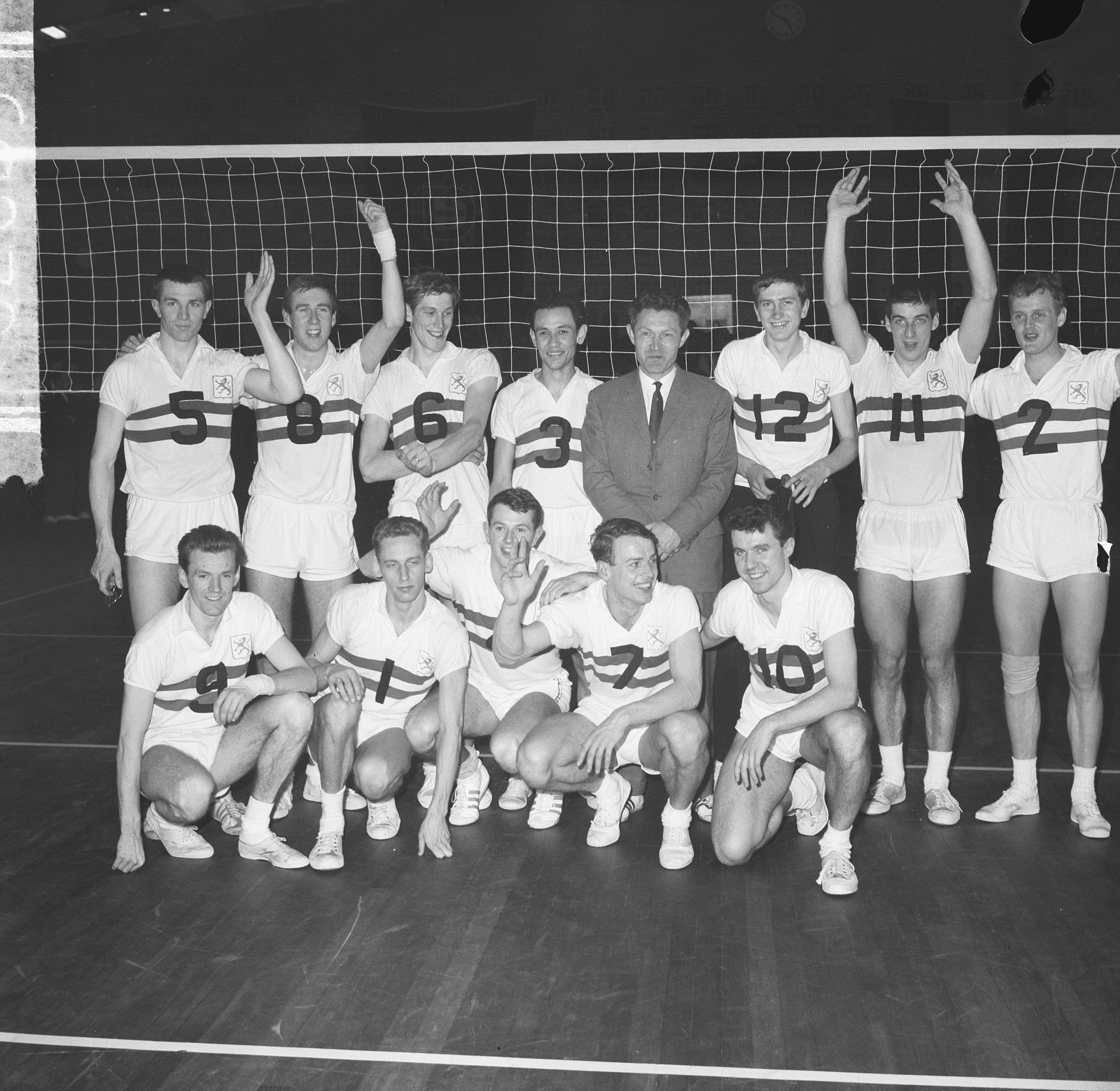 Collectie / Archief : Fotocollectie Anefo Reportage / Serie : [ onbekend ] Beschrijving : Europese kampioenschappen volleybal te Hengelo, het Nederlands volleybalteam dat de titel behaalde Datum : 4 april 1964 Locatie : Hengelo, Overijssel Trefwoorden : KAMPIOENSCHAPPEN, VOLLEYBAL Fotograaf : Koch, Eric / Anefo Auteursrechthebbende : Nationaal Archief Materiaalsoort : Negatief (zwart/wit) Nummer archiefinventaris : bekijk toegang 2.24.01.03 Bestanddeelnummer : 916-2689